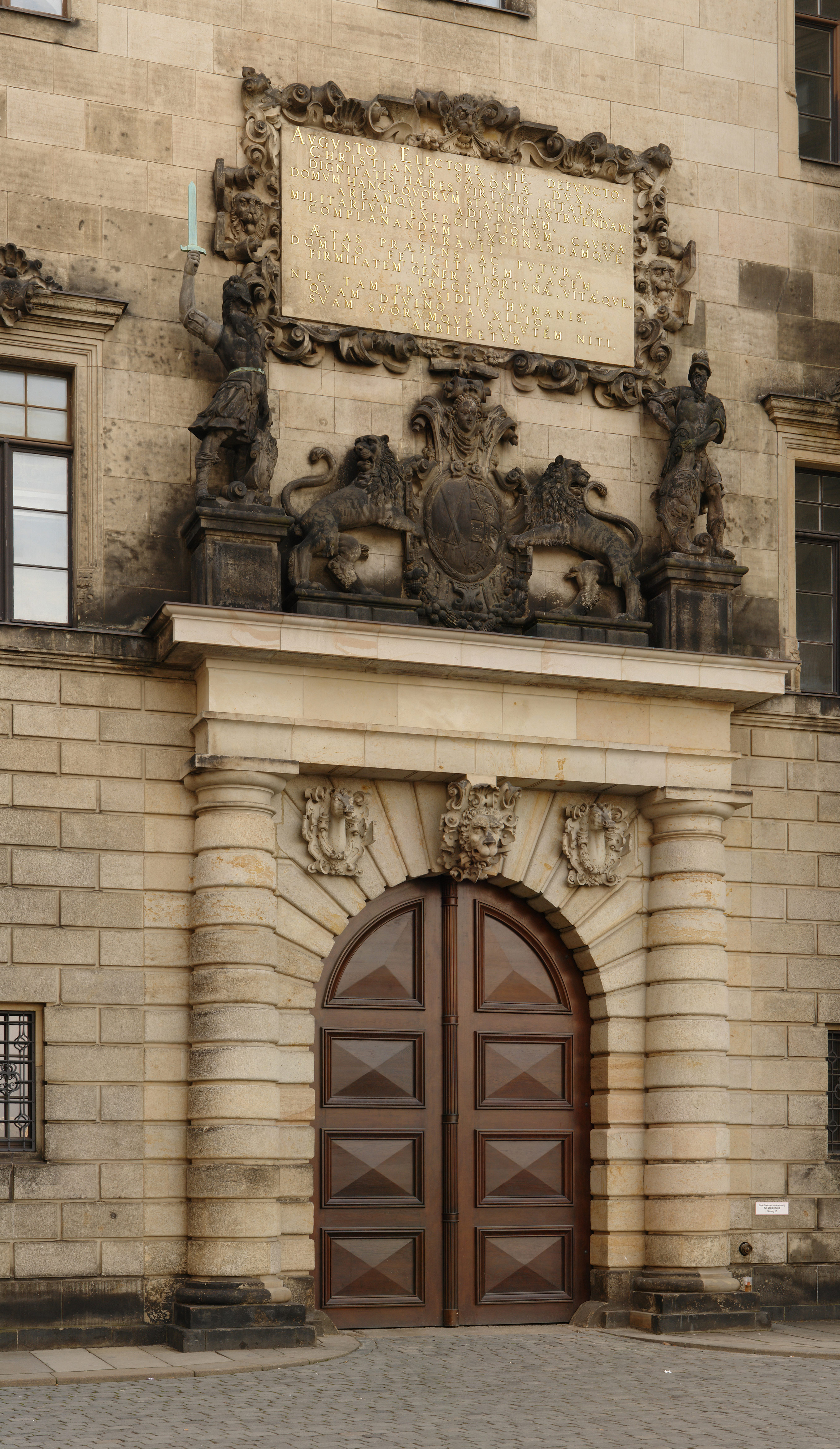 Jagdtor am Georgenbau Zugang zum Stallhof Latein: "AUGUSTO ELECTORE PIÈ DEFUNCTO / CHRISTIANUS SAXONIAE DUX / DIGNITATIS HAERES VIRTUTIS IMITATOR / DOMUM HANC EQUORUM STATIONI EXTRUENDAM / AREAMQUE ADIUNCTAM / MILITARIUM EXERCITATIONUM CAUSSA / COMPLANANDAM EXORNANDAMQUE / CURAVIT / AETAS PRAESENS AC FUTURA / DOMINO FELICITATEM PACEM / PIRMITATEM GENER S FORTUNAE VITAEQUE / PRECETUR / NEC TAM PRAESIDIIS HUMANIS / QUAM DIVINO AUXILIO / SUAM SUORUMQUE SALUTEM NITI / ARBITRETUR"